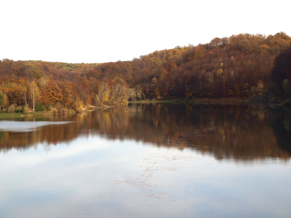 Jezero Petnja u Slavonskom Brodu.